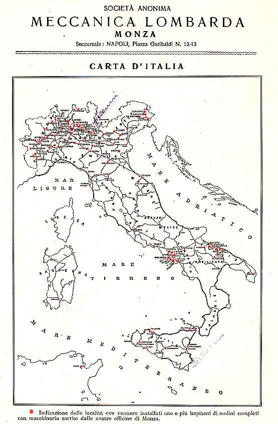 Società Anonima Meccanica Lombarda - carta d'Italia con l'indicazione dei molini costruiti nel periodo 1901-1908